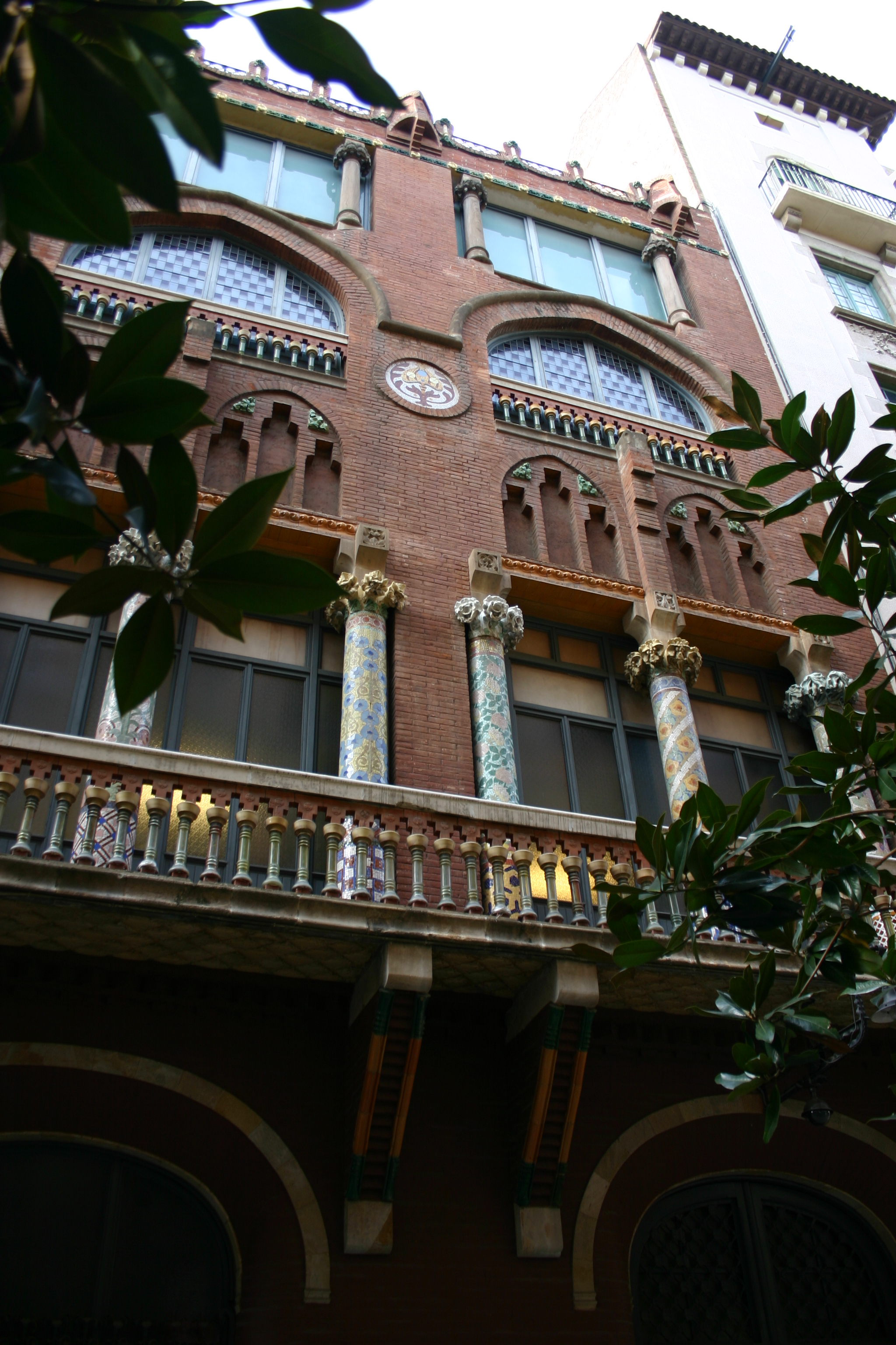 Palau de la Música Catalana. Arquitecte:Lluís Domènech i Montaner